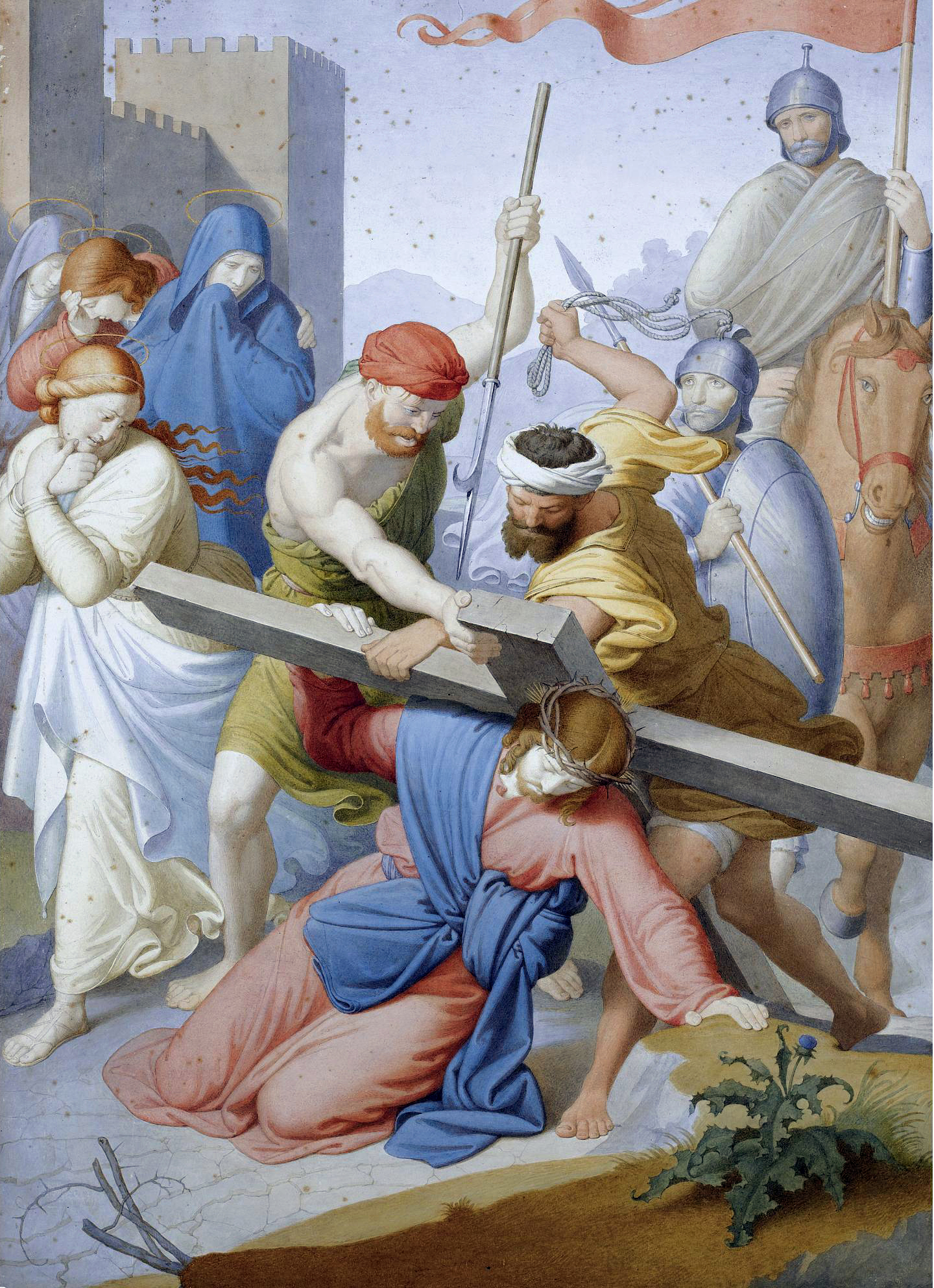 Overbeck - Via Crucis - Station VII